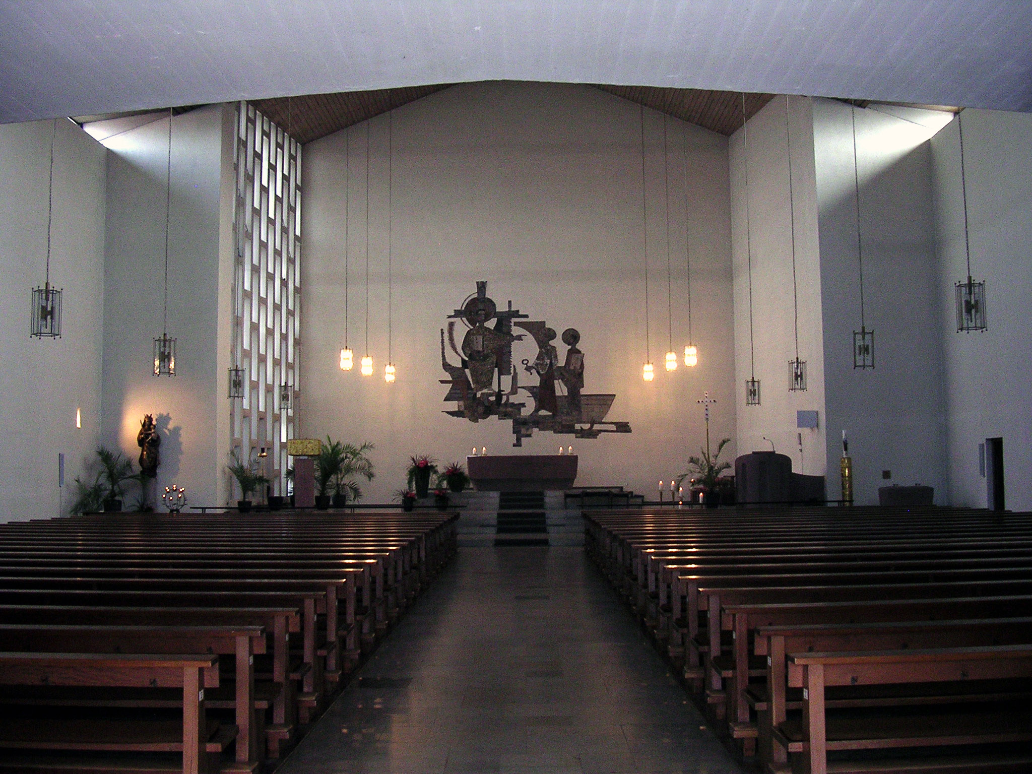 St. Peter und Paul Obernau - Innenansicht